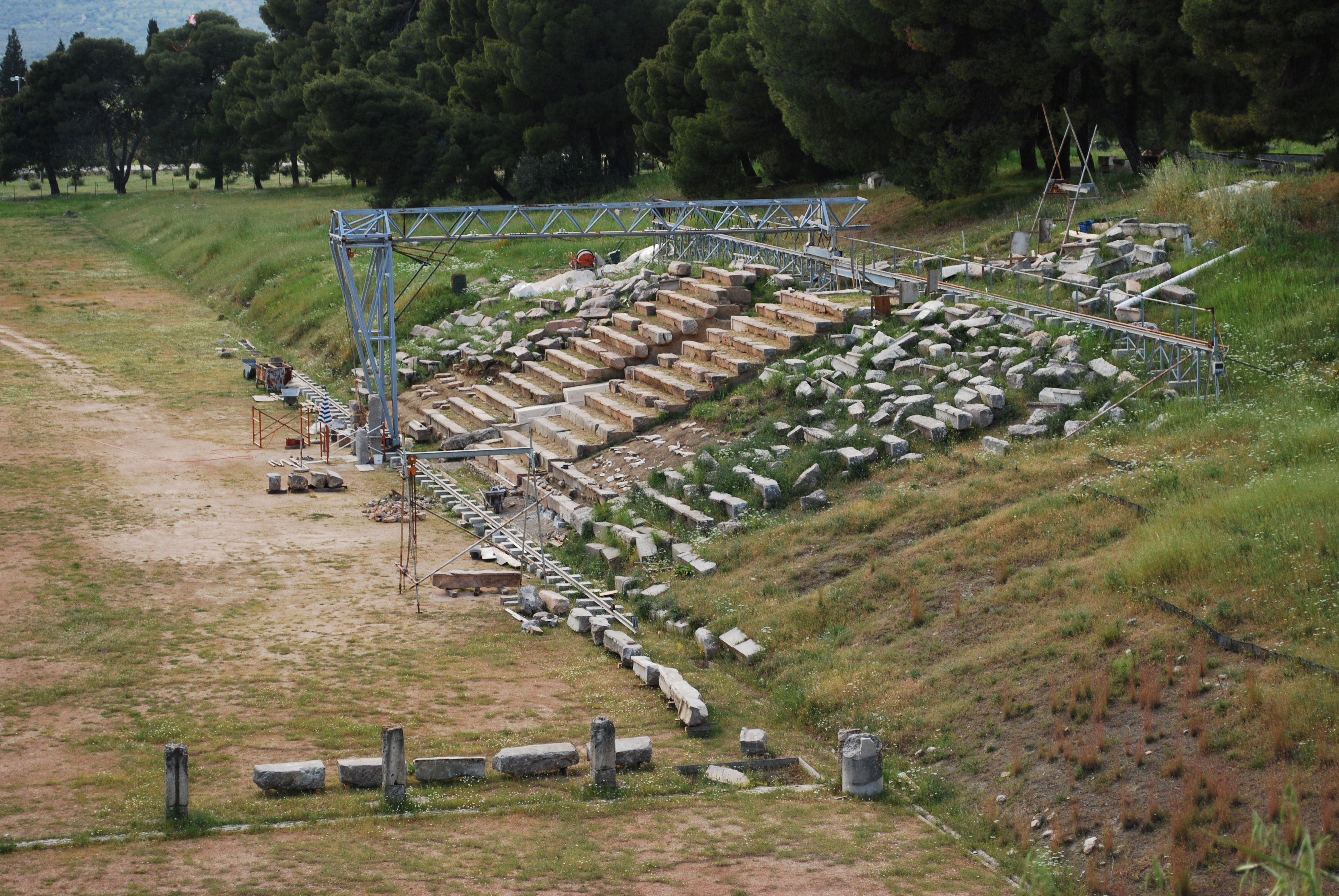 Epidaure : le stade.